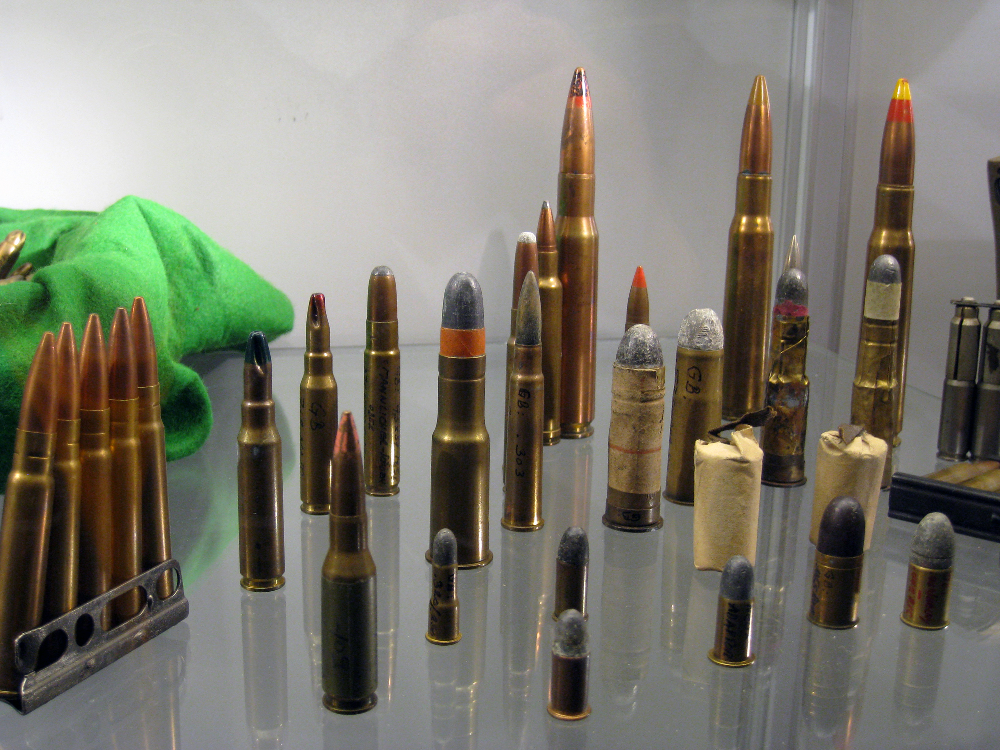 Festungsmuseum Reuenthal, Sonderausstellung Walter H. Zuleger 2015/16, britische Patronen